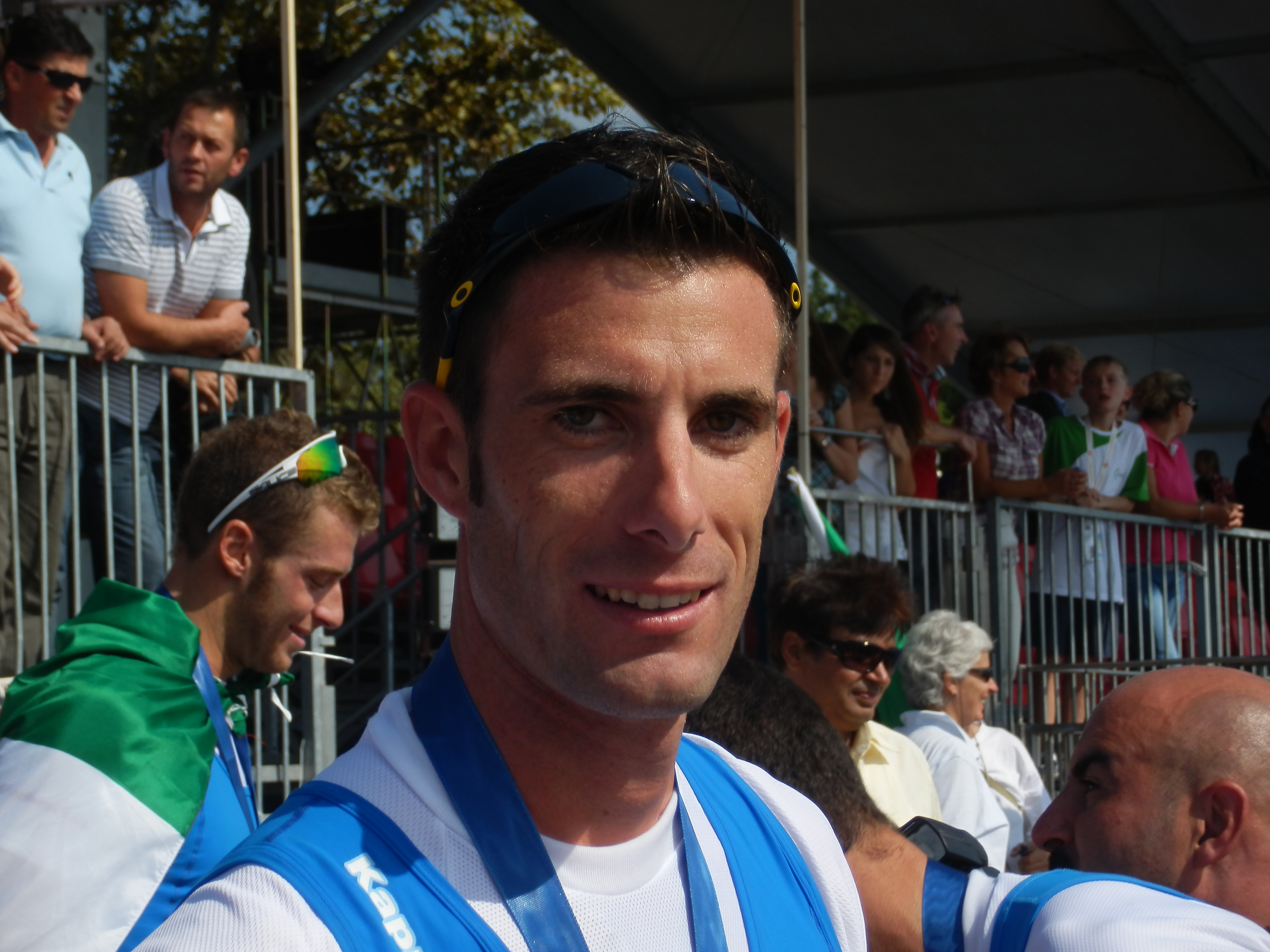 Canciani dopo la premiazione con la medaglia d'argento agli Europei 2012